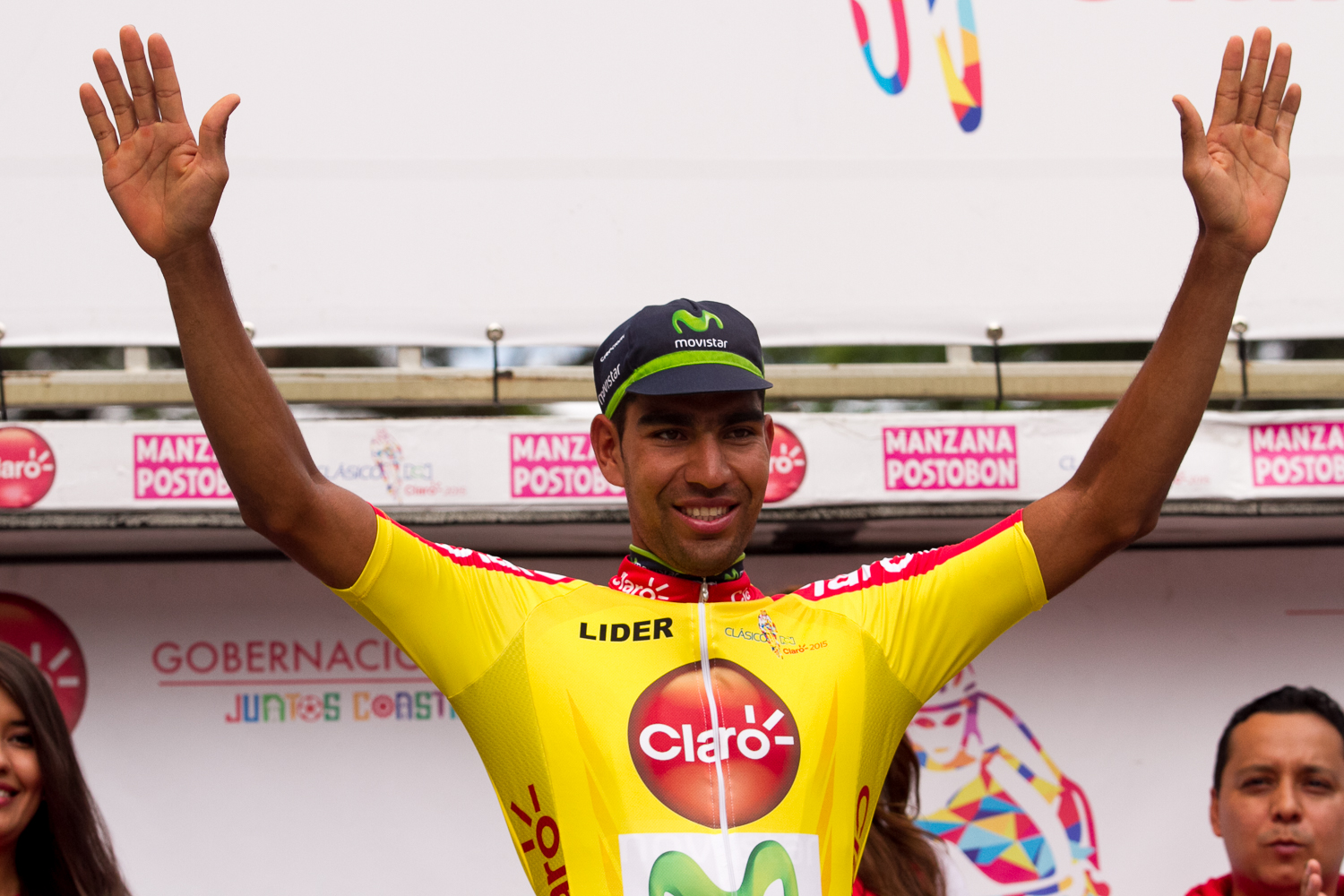 Eta.9 Clásico RCN 2015 Sábado 3 de octubre de 2015. Buga - Ibagué (195Kms).